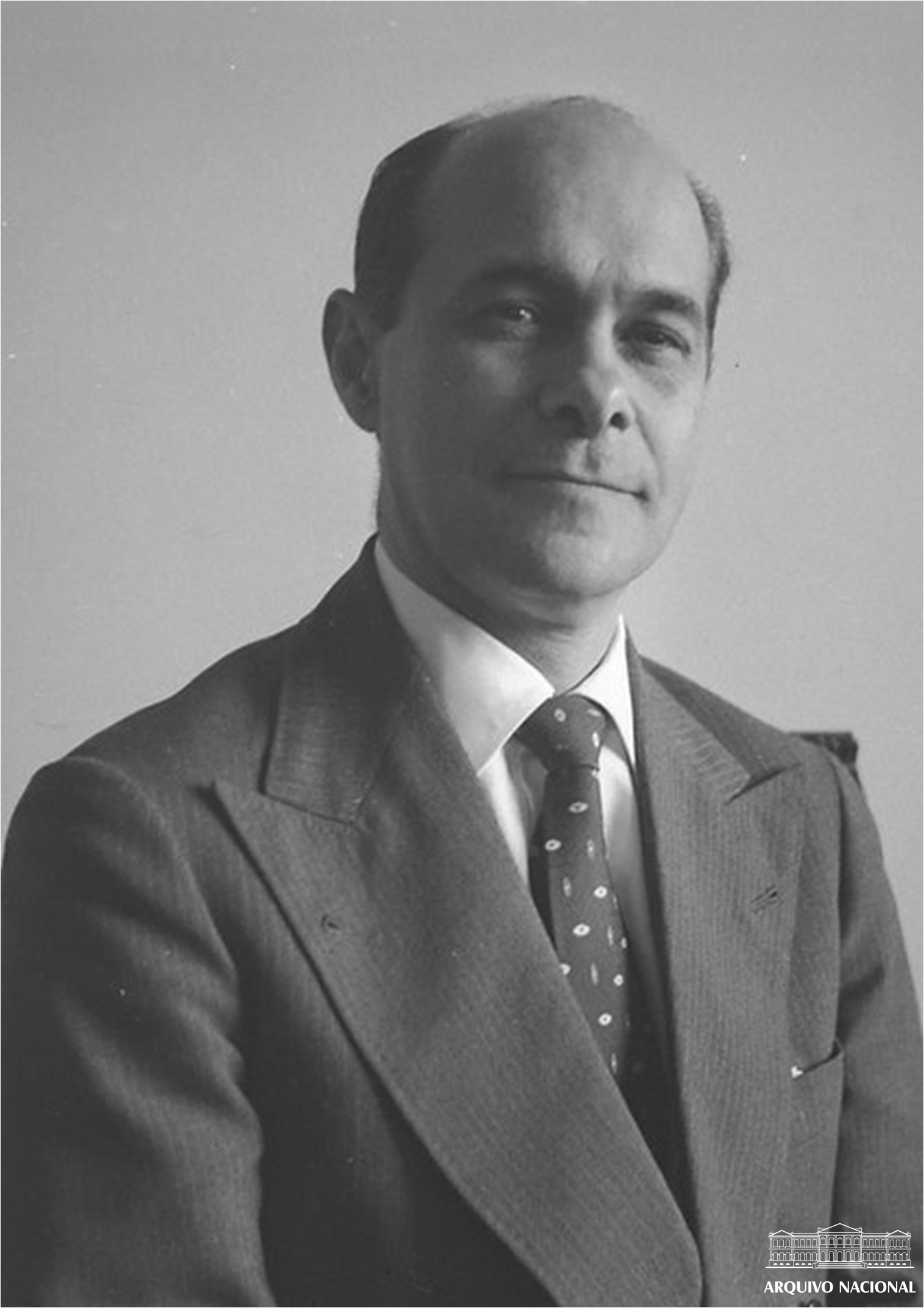 Tancredo de Almeida Neves, primeiro ministro, 1962. Arquivo Nacional. Fundo Correio da Manhã. BR_RJANRIO_EH_0_FOT_PPU_05341_0003